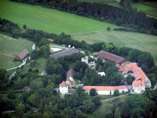 Burgruine Neuhaus in Igersheim.